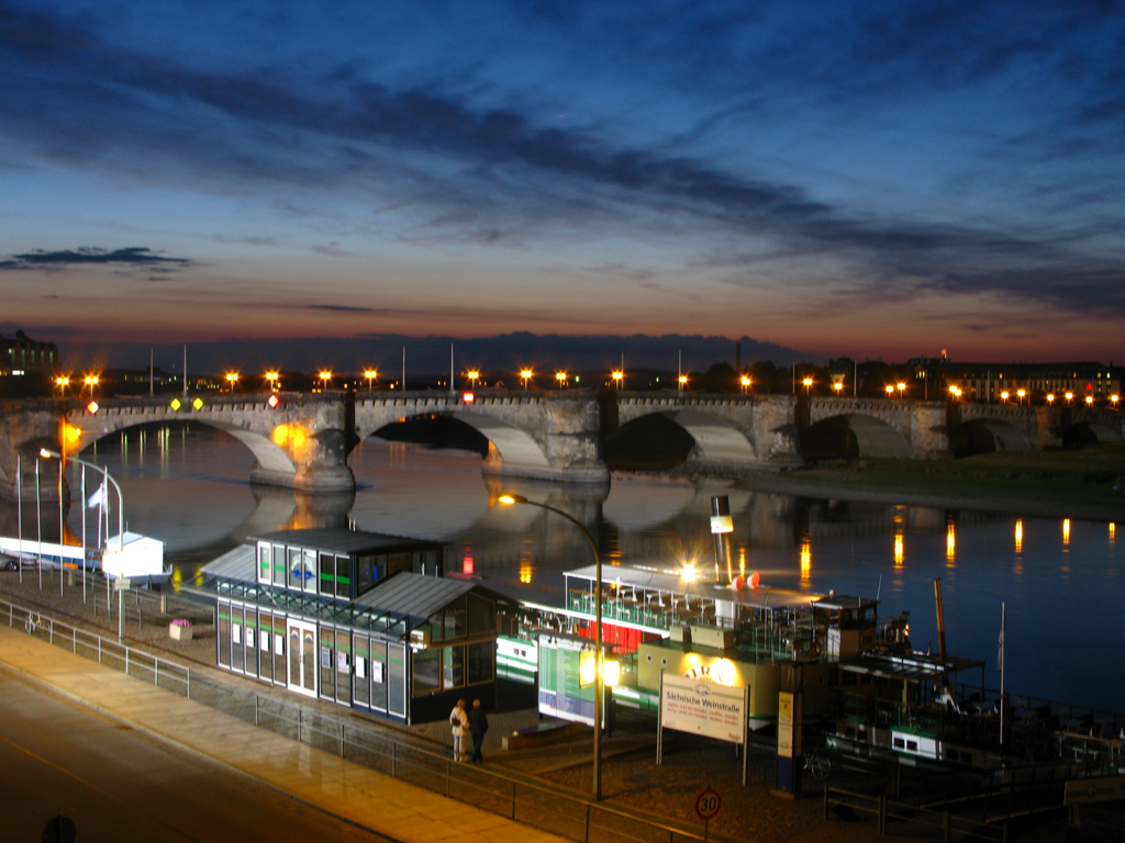 Die Augustusbrücke in Dresden während der Museums-Sommernacht 2008.